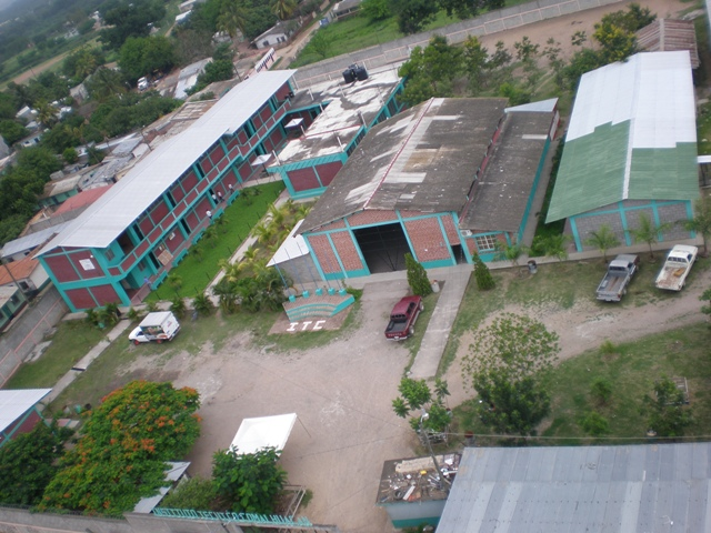 Vista de aulas, salón de actos, laboratorio de CCNN y Biblioteca